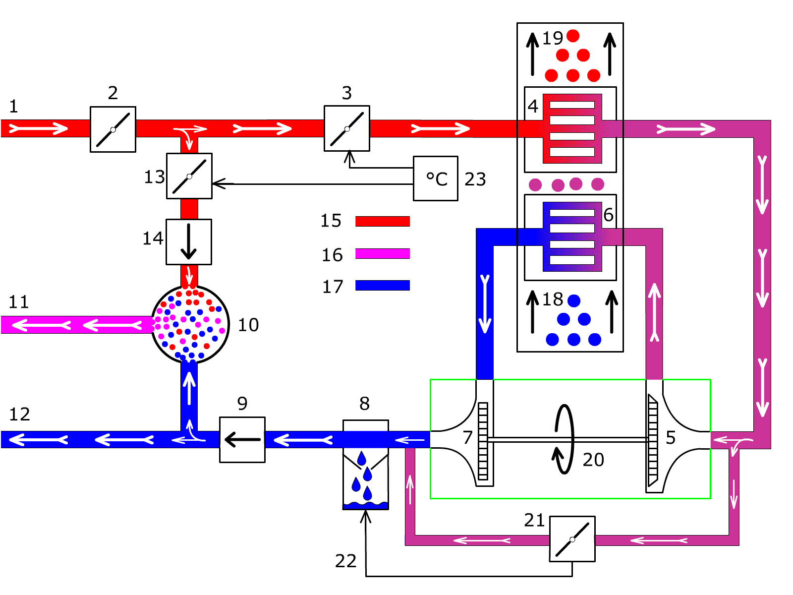 Prinzipzeichnung einer allgemeinen Klimanalga (Packs) - kein bestimmter Flugzuegtyp